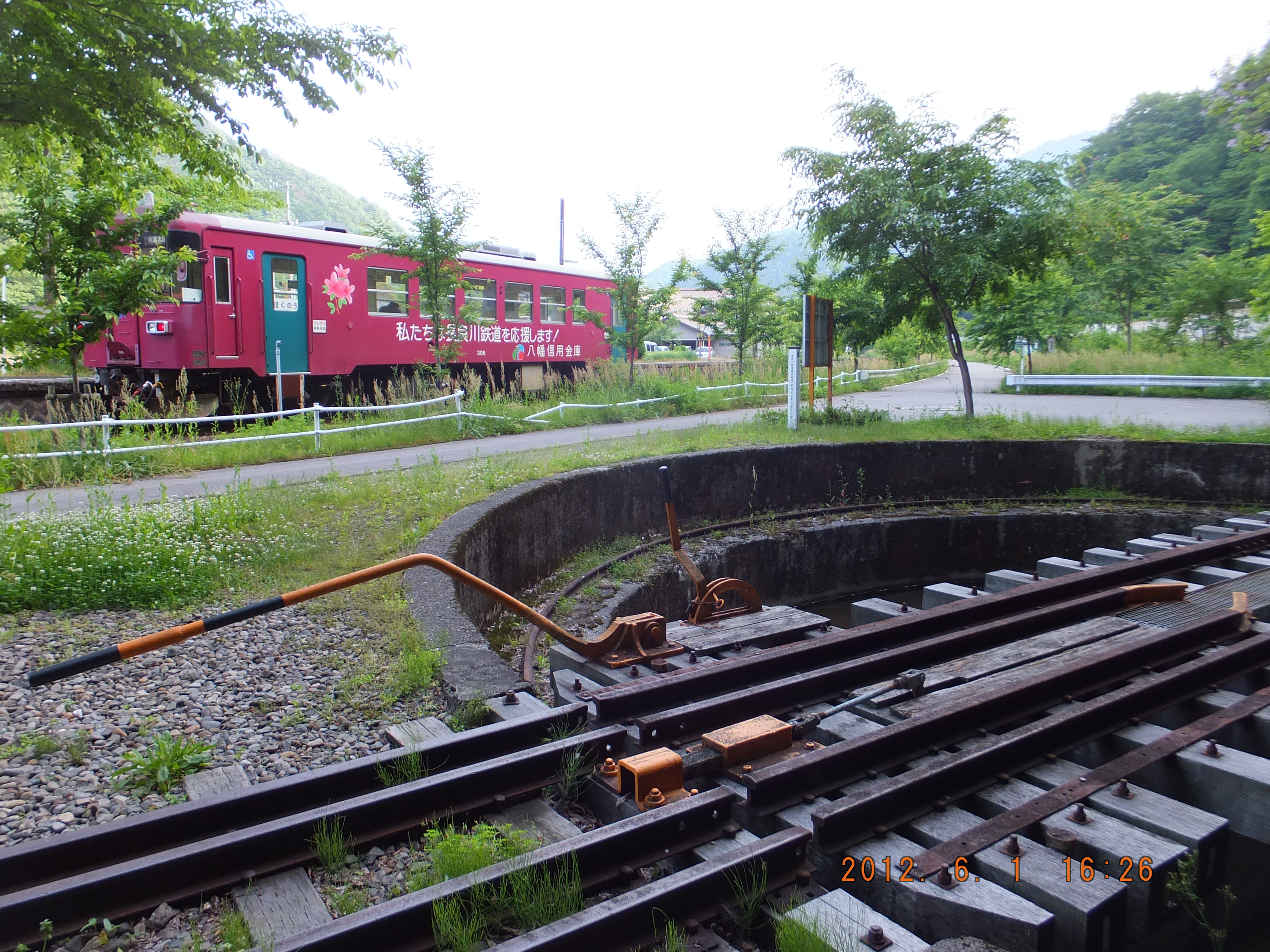 ターンテーブル（北濃駅）